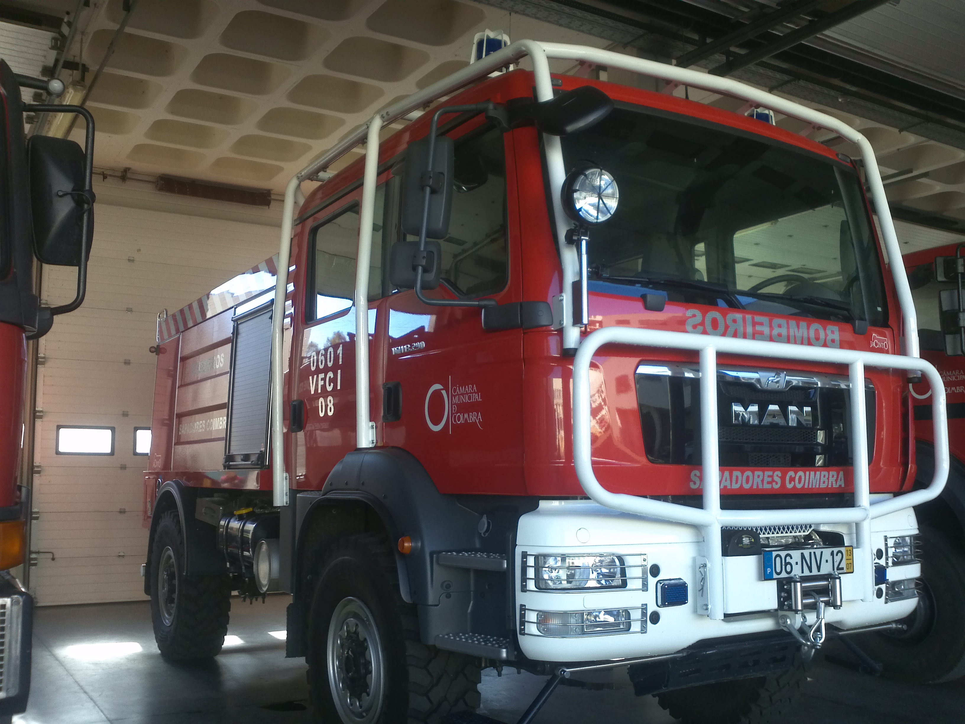 Veiculo Florestal de Combate a Incêndios